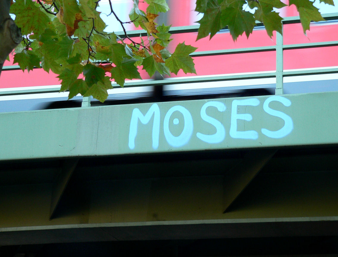 Tag von Moses in Hannover an der Bahnunterführung Vahrenwalder Str.